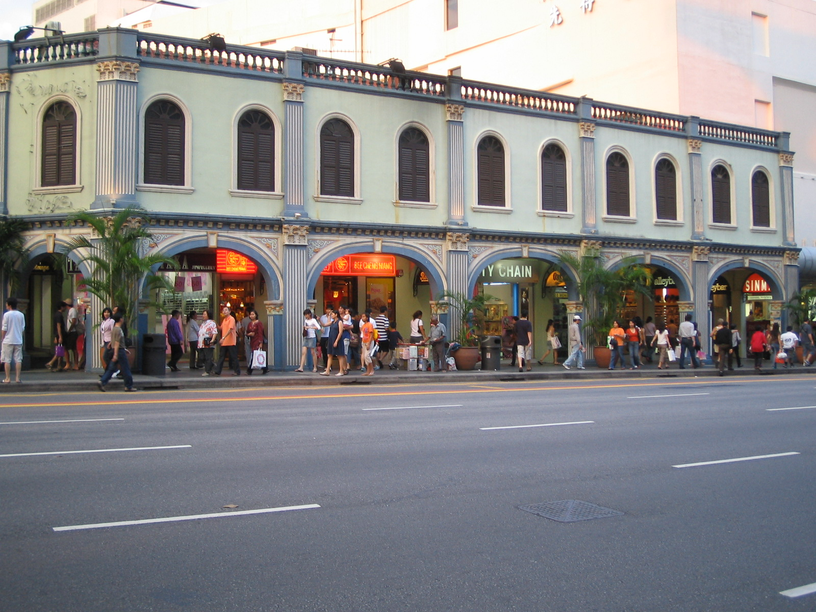 Peranakan Place.